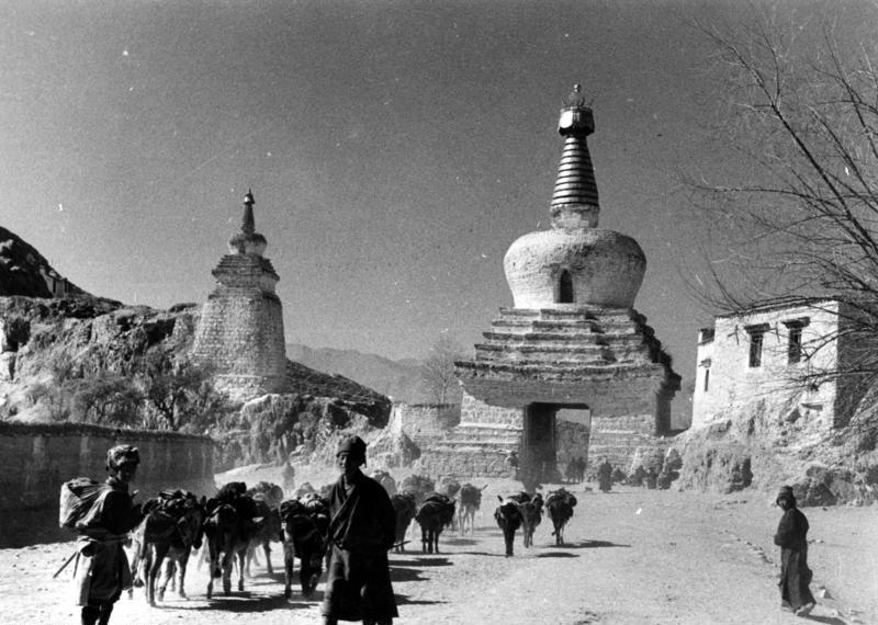 Lhasa, der zweibeinige Tschorten